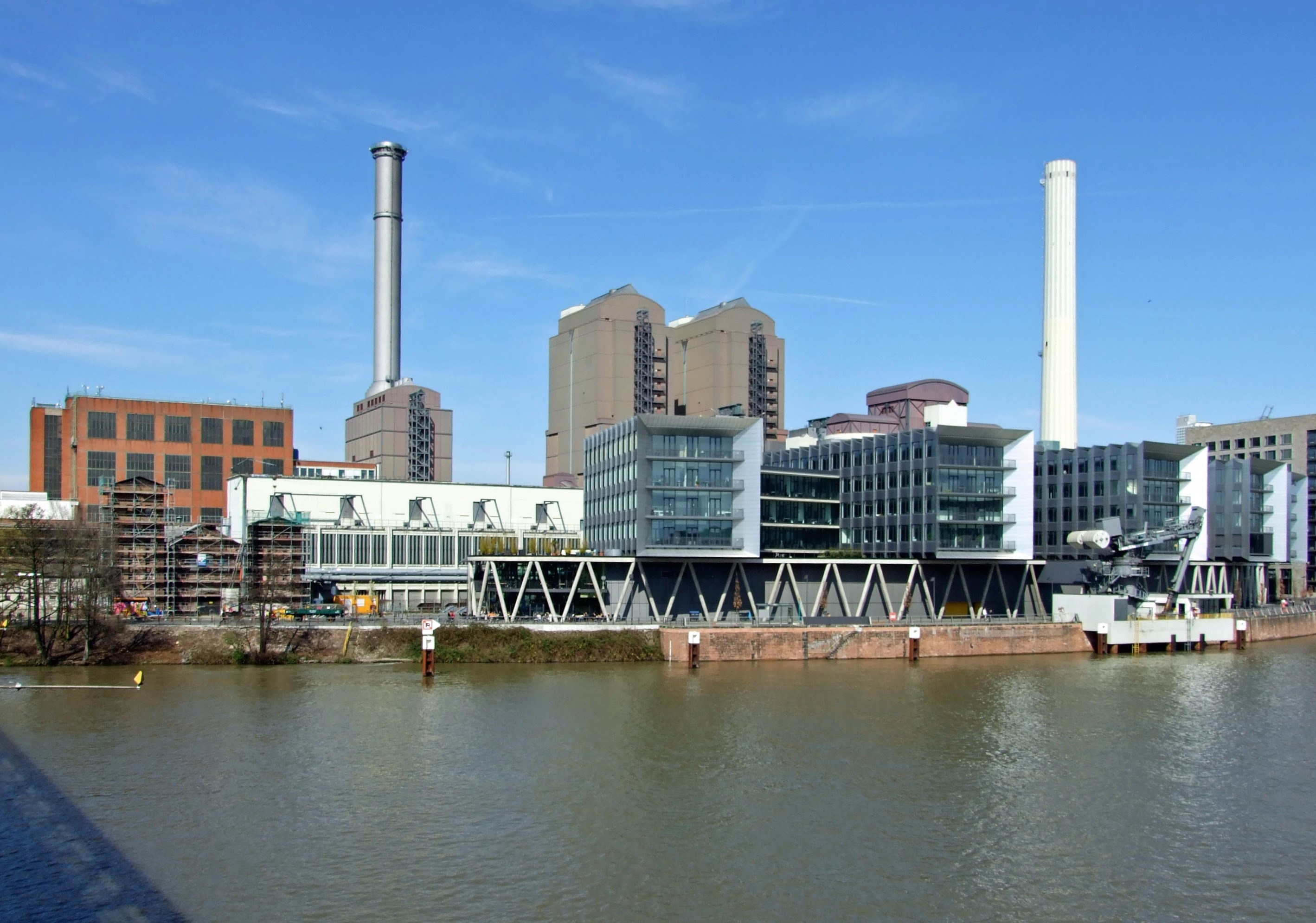 Das HKW-West der „Mainova“, zwischen der „Main-Neckar-Bruecke“, Gutleutstrasse, Zanderstrasse, Rotfederring und Speicherstrasse; hinter den Haeusern an der „Westhafenpier“.